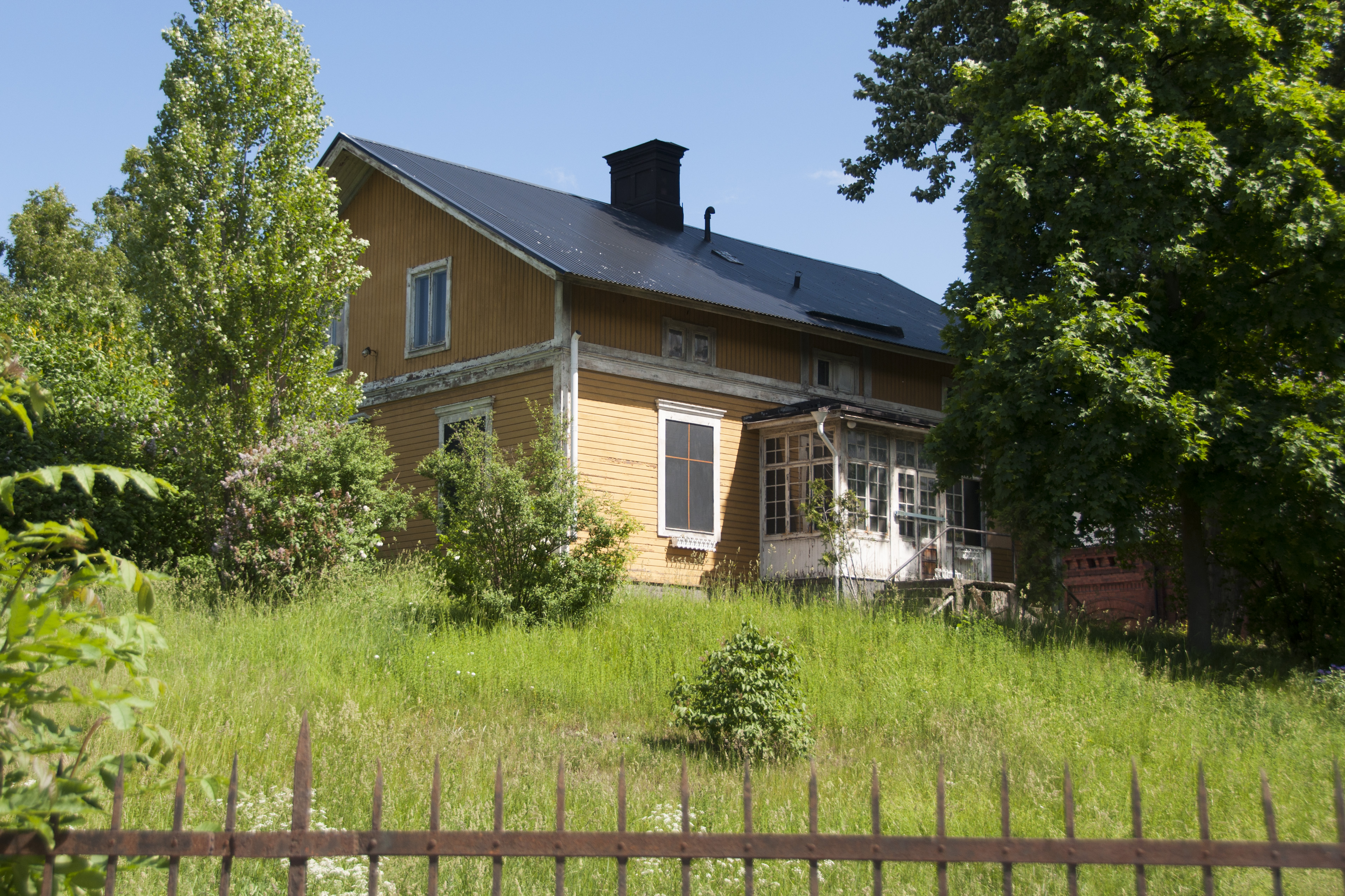 Stallchefens bostadshus. Uppfört uppfördes 1886